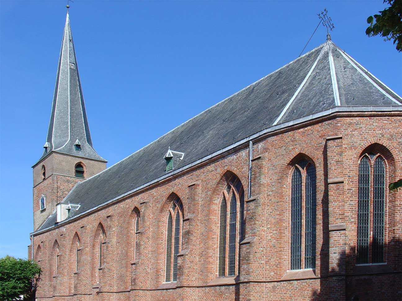 Kerk van Kollum)